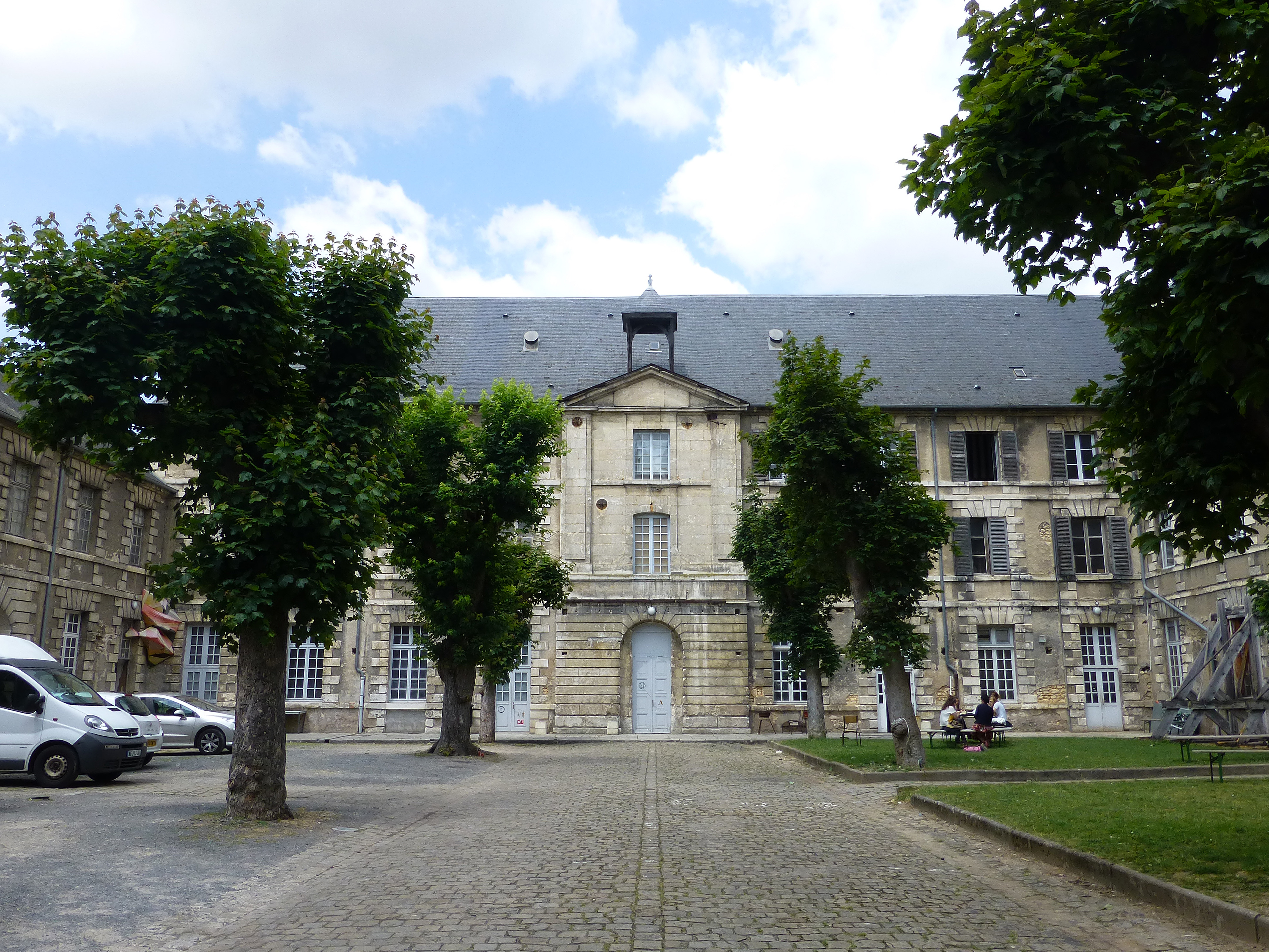 Bourges (Cher) : ancien Collège des Jésuites, aujourd'hui Ecole nationale supérieure d'art